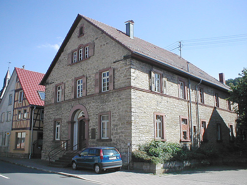 Ehem. Synagoge in Adelsheim-Sennfeld